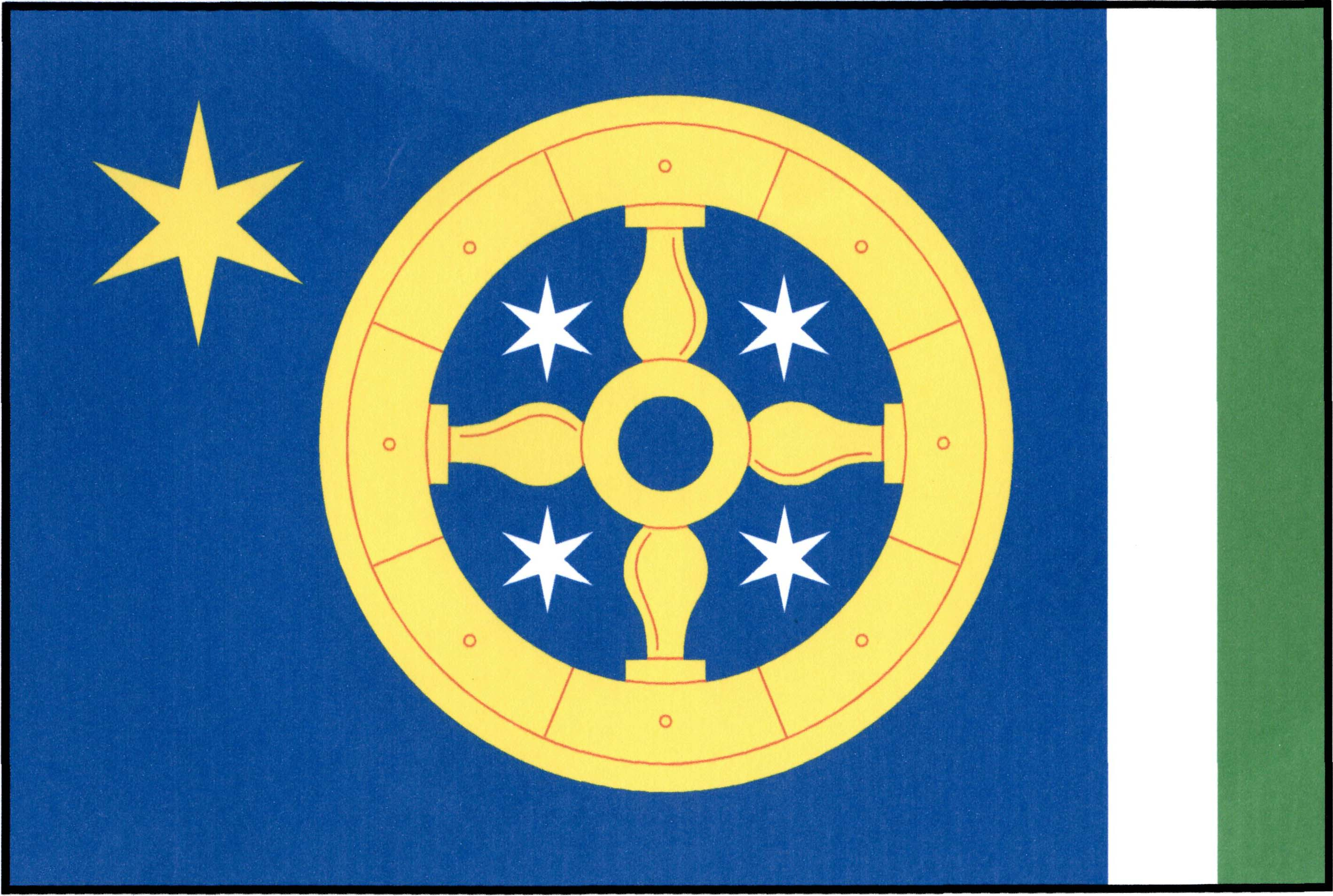 Vlajka obce Dlažov